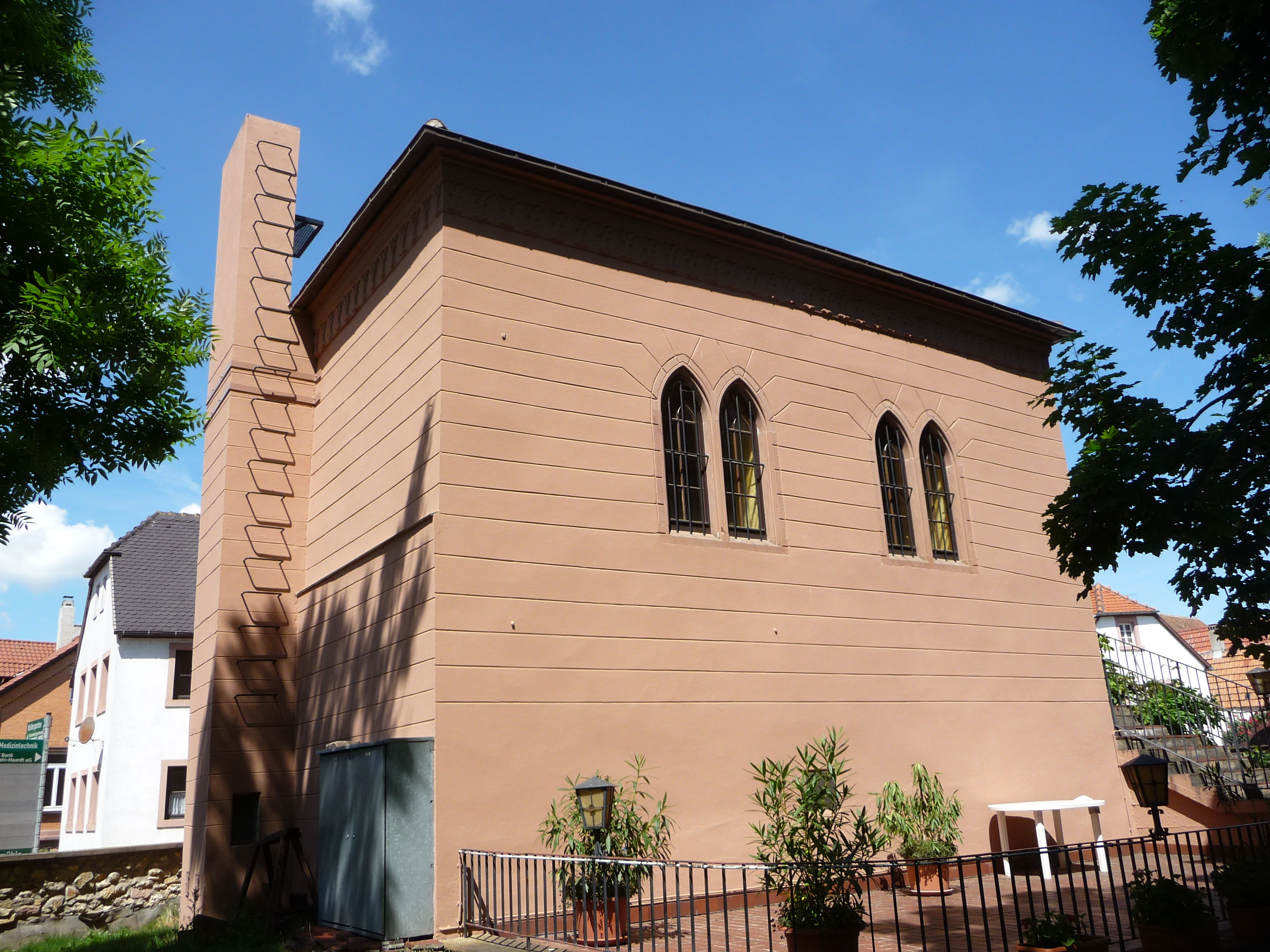 Die „Fechtschule“ Dirmstein ist ein klassizistisches Gebäude, liegt südlich des Ortszentrums am Rande des Kellergartens.